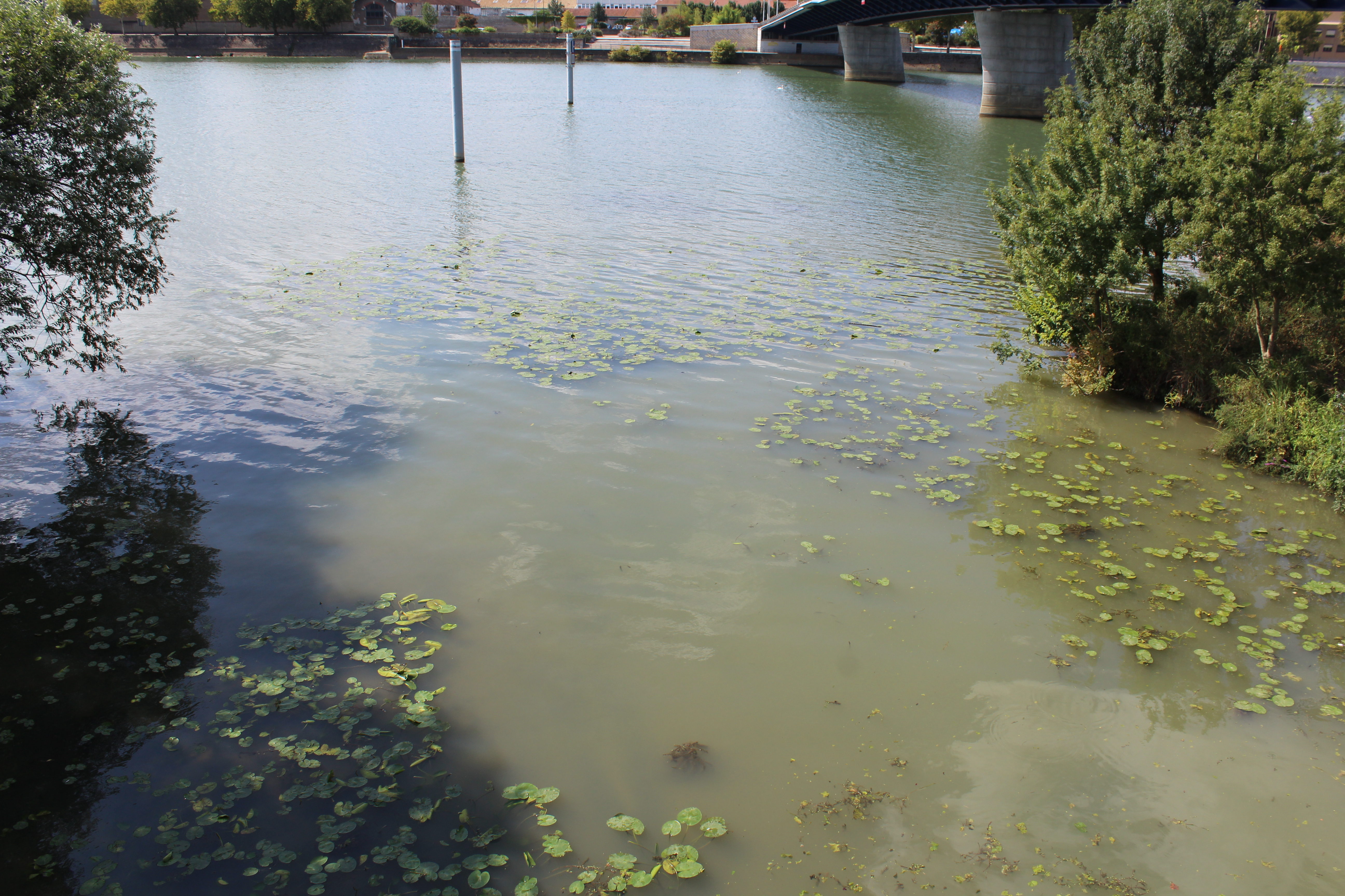 Le confluent de la Veyle et de la Saône à Grièges.